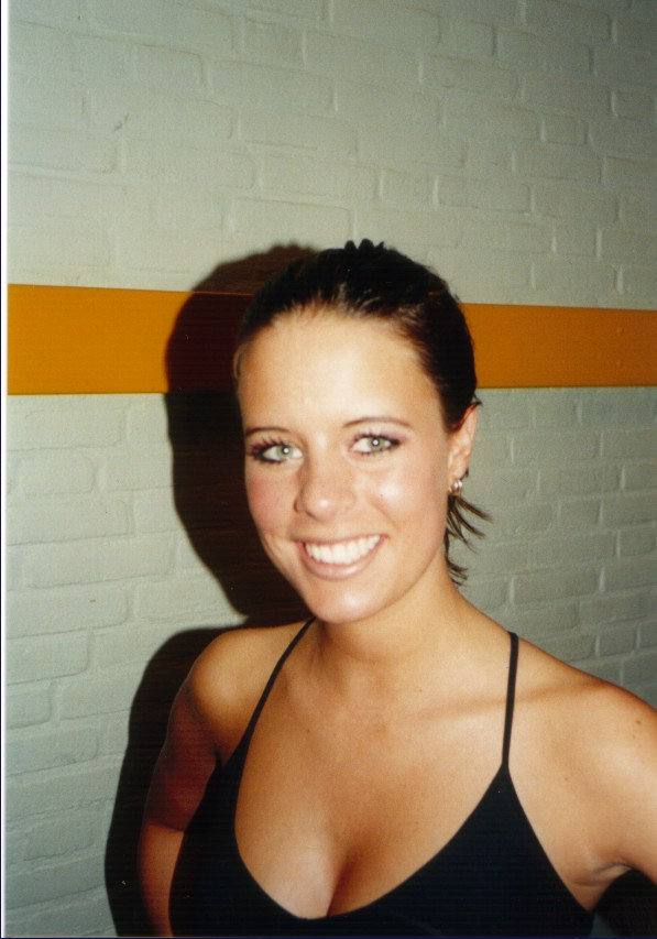 Denise Koopal van meidengroep Wow! voor een optreden in Nieuw-Lekkerland op 29 April 2000